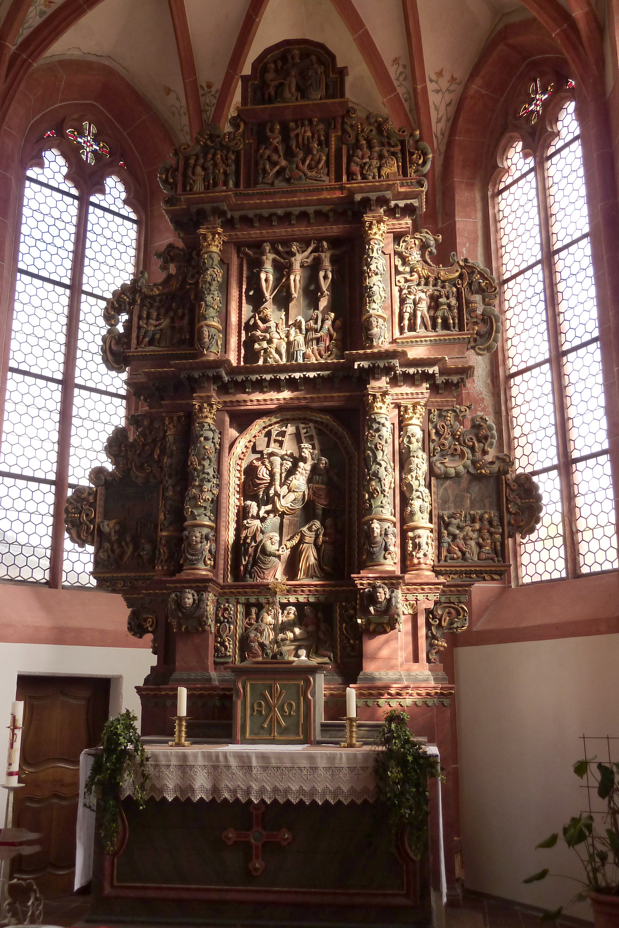 Katholische Wallfahrtskirche Mater Dolorosa in Driesch, einem Ortsteil von Lutzerath im Landkreis Cochem-Zell (Rheinland-Pfalz), Bitter-Leidens-Altar, von Bartholomäus Hammes aus Alflen um 1672 geschaffen